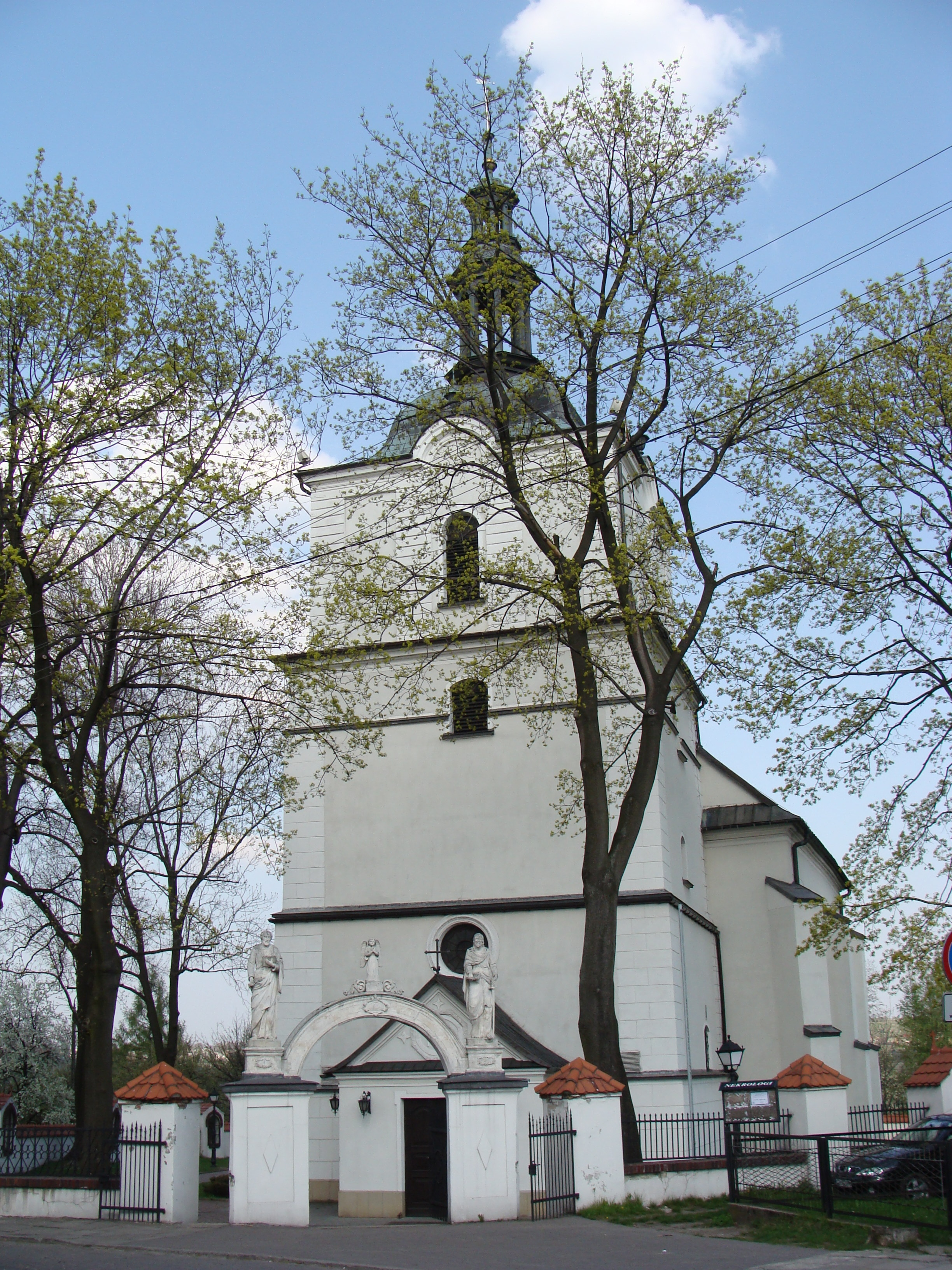 Sławków kościół Podwyższenia Krzyża Świętego